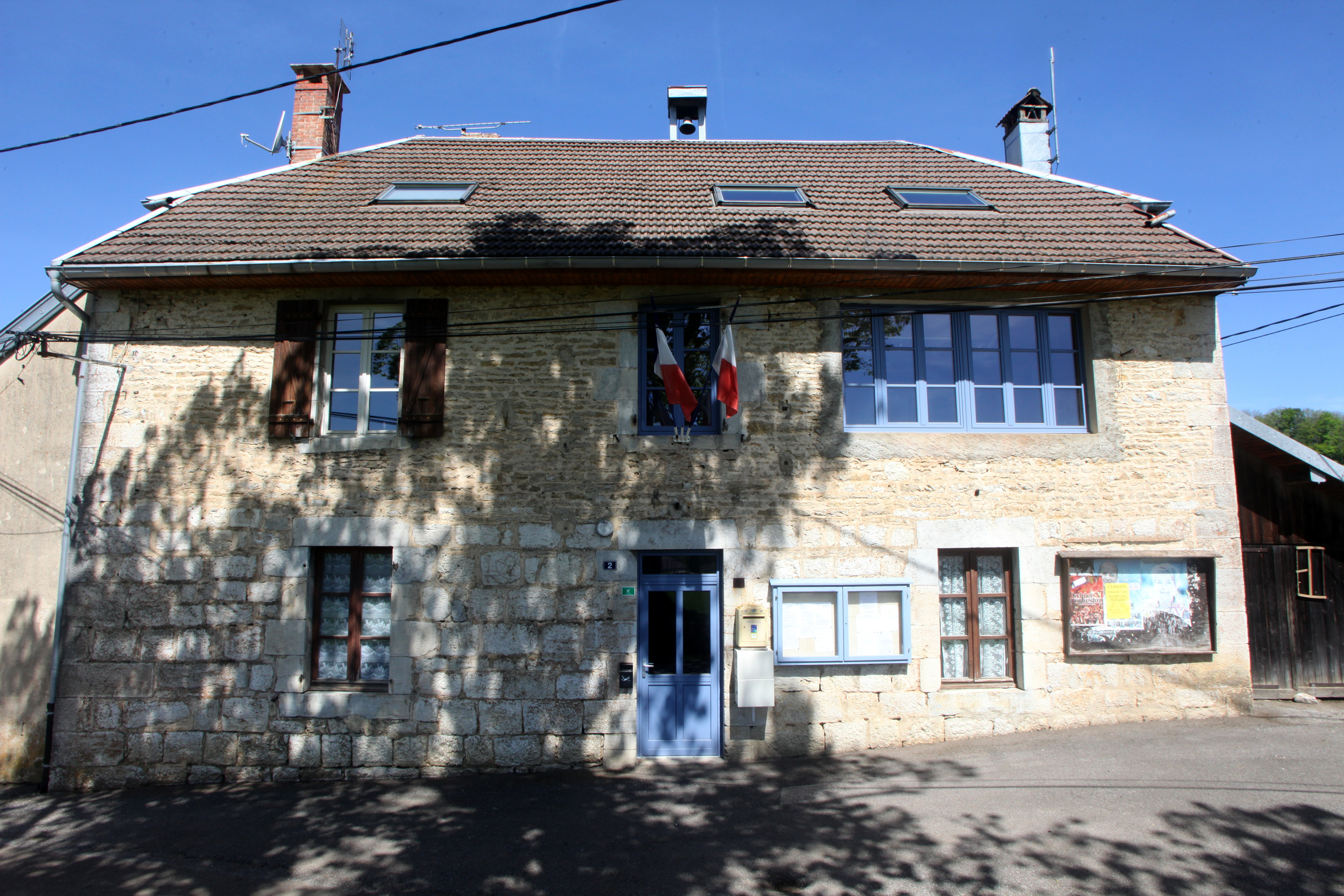 Mairie de Sainte-Anne (Doubs).